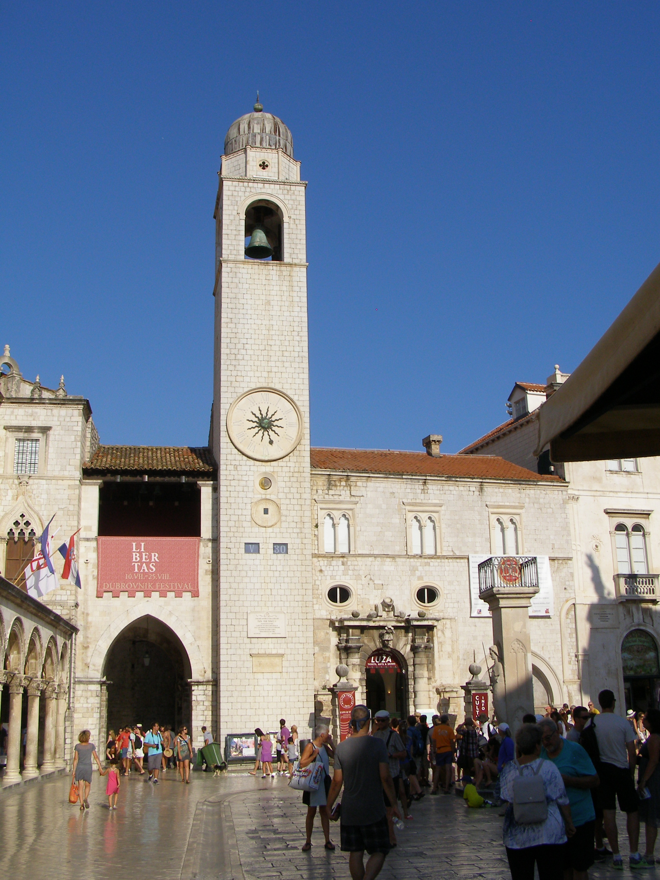 Dubrovnik: Glockenturm am Ende des Stradun, links Glockenturmloge Luža mit Durchgang zum Hafen, Sponza-Palast, rechts die Hauptwache, davor die Rolandsäule